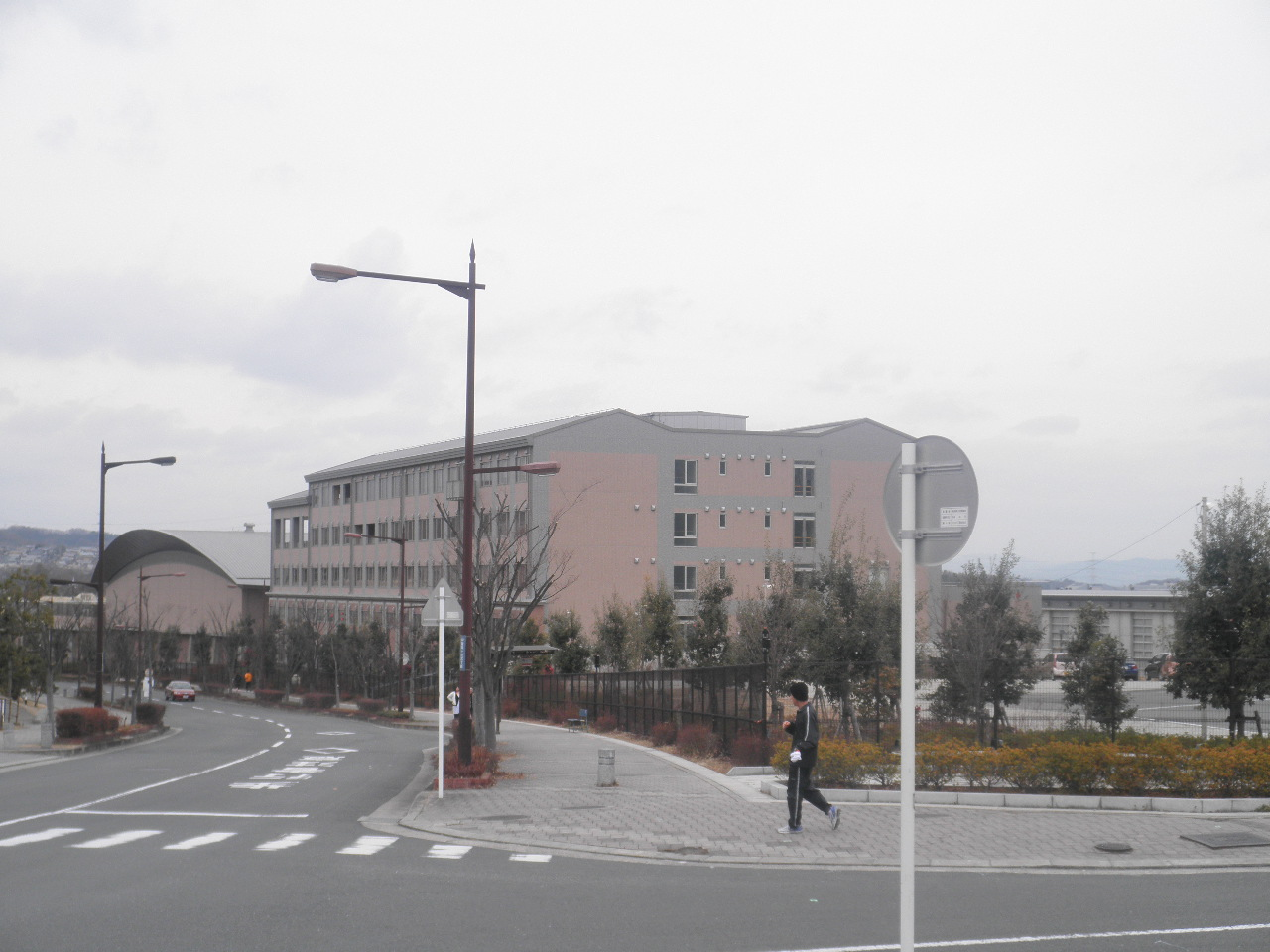 奈良文化女子短期大学